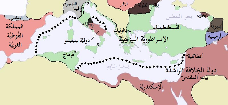 خارطة للإمبراطوريَّة البيزنطيَّة ودولة الخِلافة الراشدة سنة 650م.